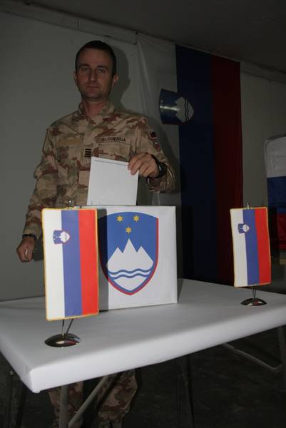 Predčasne državnozborske volitve pripadnic in pripadnikov Slovenske vojske v mednarodnih operacijah in na misijah